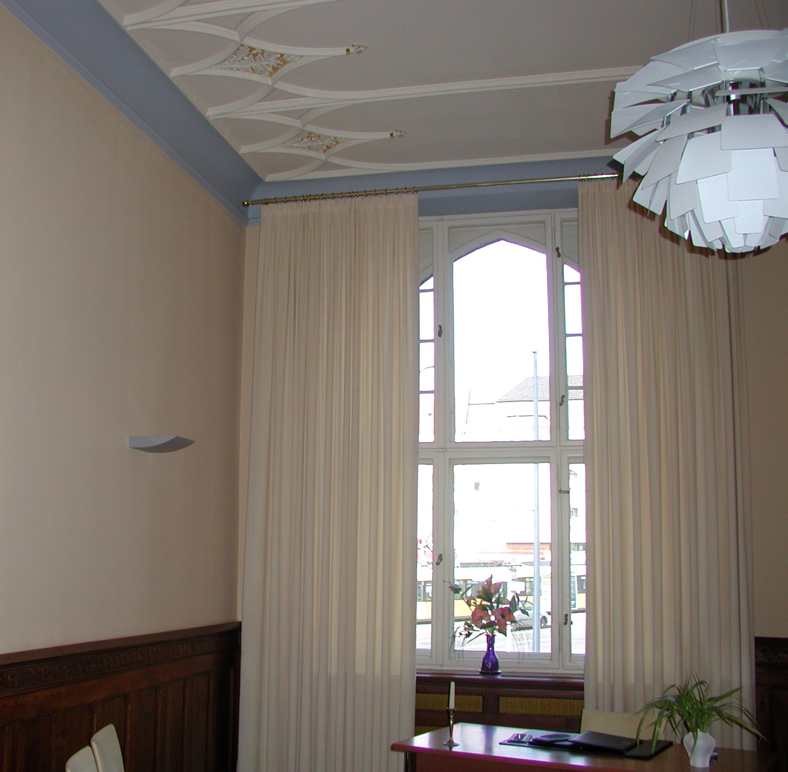 Rathaus Lichtenberg - Blick in den Eheschließungssaal